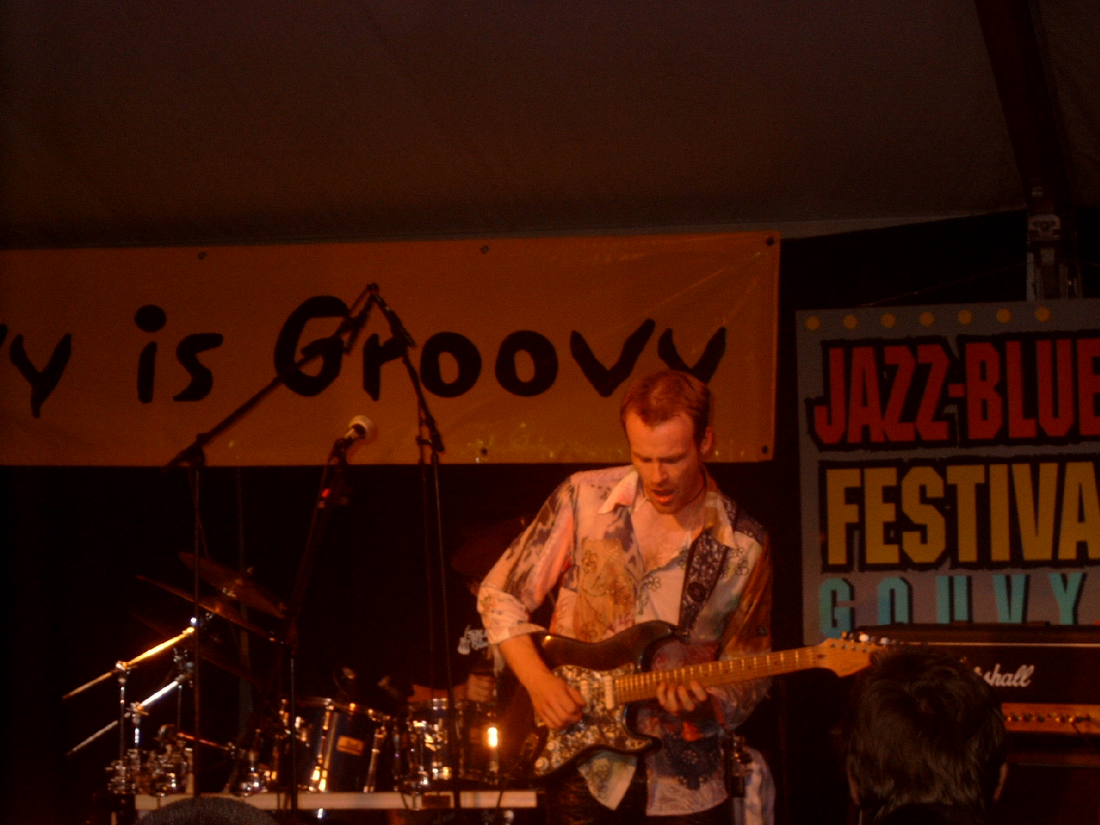 Le chanteur/guitariste Joe Gooch du groupe Rock Ten Years After au Jazz & Blues Festival de Gouvy en août 2004.